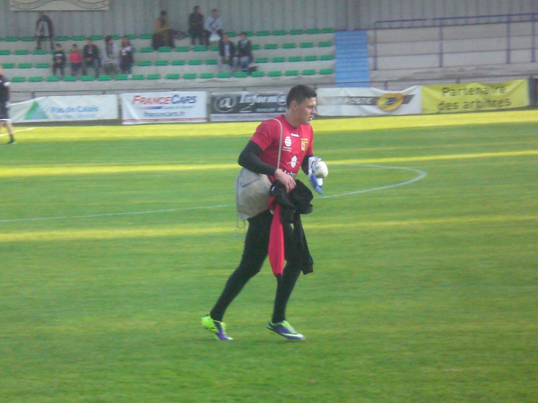 Dan Delaunay avant le match RC Lens B / US Quevilly Rouen, comptant pour la septième journée du Championnat de France de football amateur (CFA), le 3 octobre 2015, au Stade François Blin d'Avion.